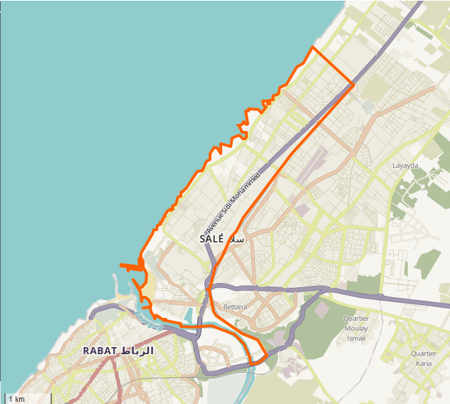 Carte de Bab Lamrissa, Salé, Maroc. Limites géographiques de la carte : N : 34.1061 E : -6.8469 W : -6.6807 S : 33.926